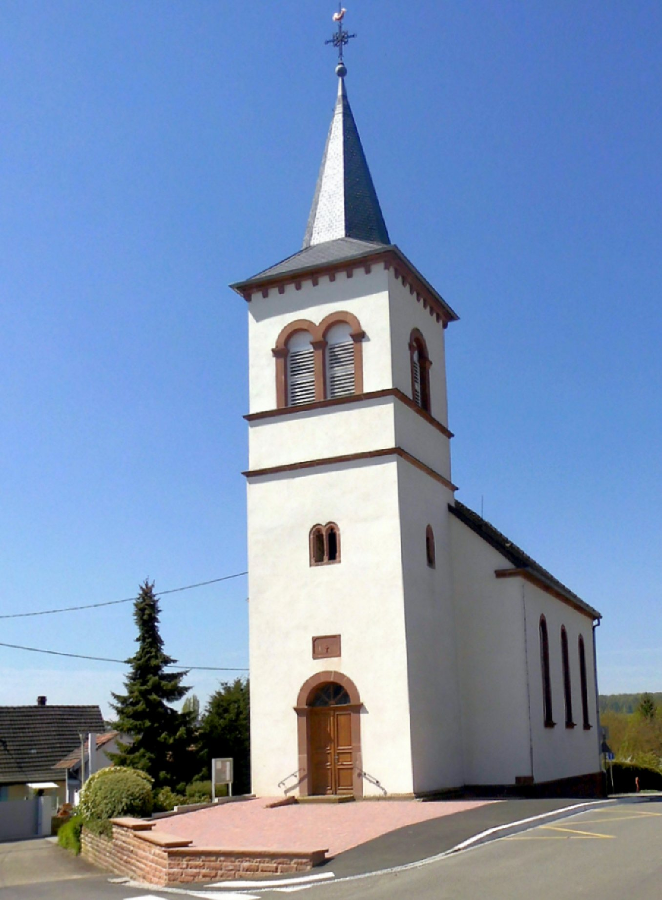 Le temple Protestant à Keffenach